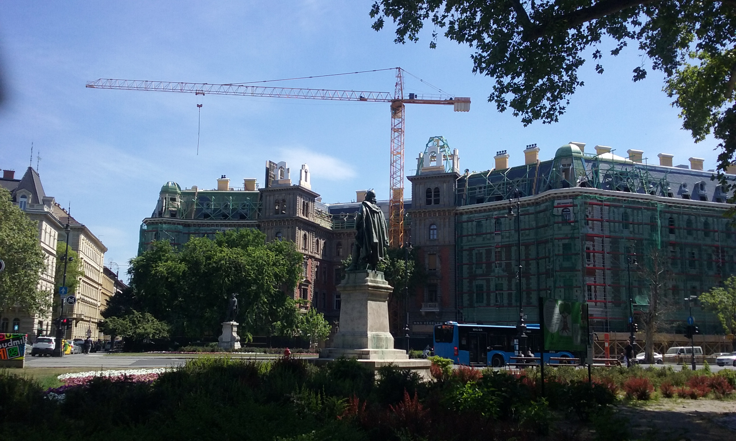 Budapest, Andrássy út 83-85., Vasutasház